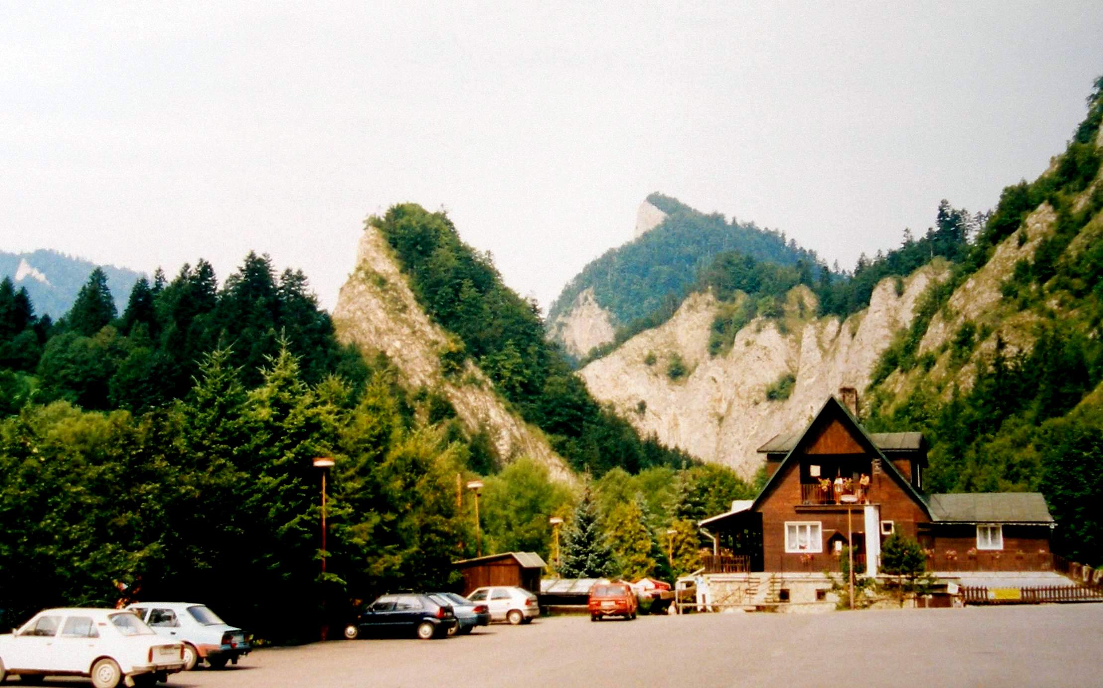 Pieninský národný park.